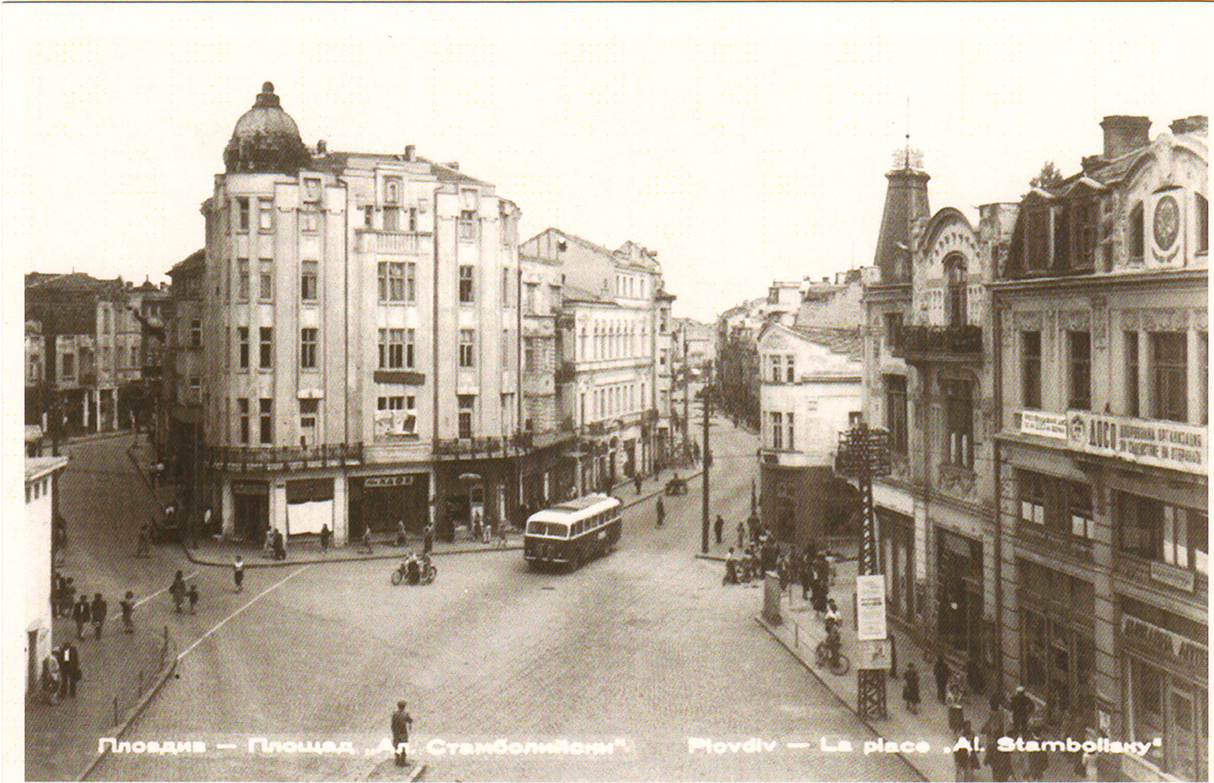 Площад Джумаята, Пловдив, България.